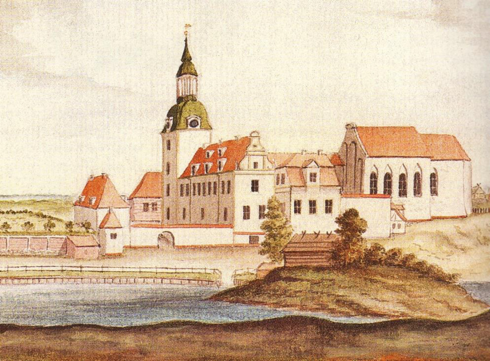 Darstellung des Schlosses Groß-Roop aus dem 18. Jahrhundert